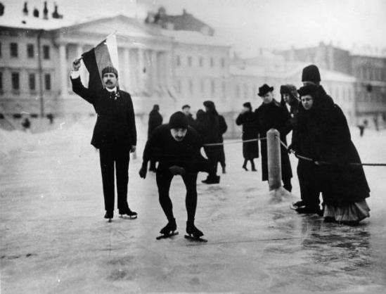 Состязание конькобежцев на Марсовом поле в Санкт-Петербурге. Фото 1914.